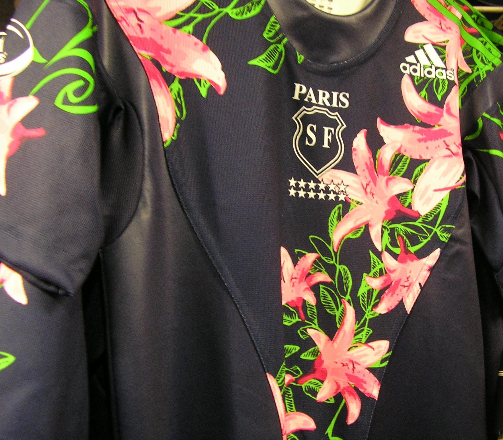 Maillot de rugby du Stade français CASG Paris